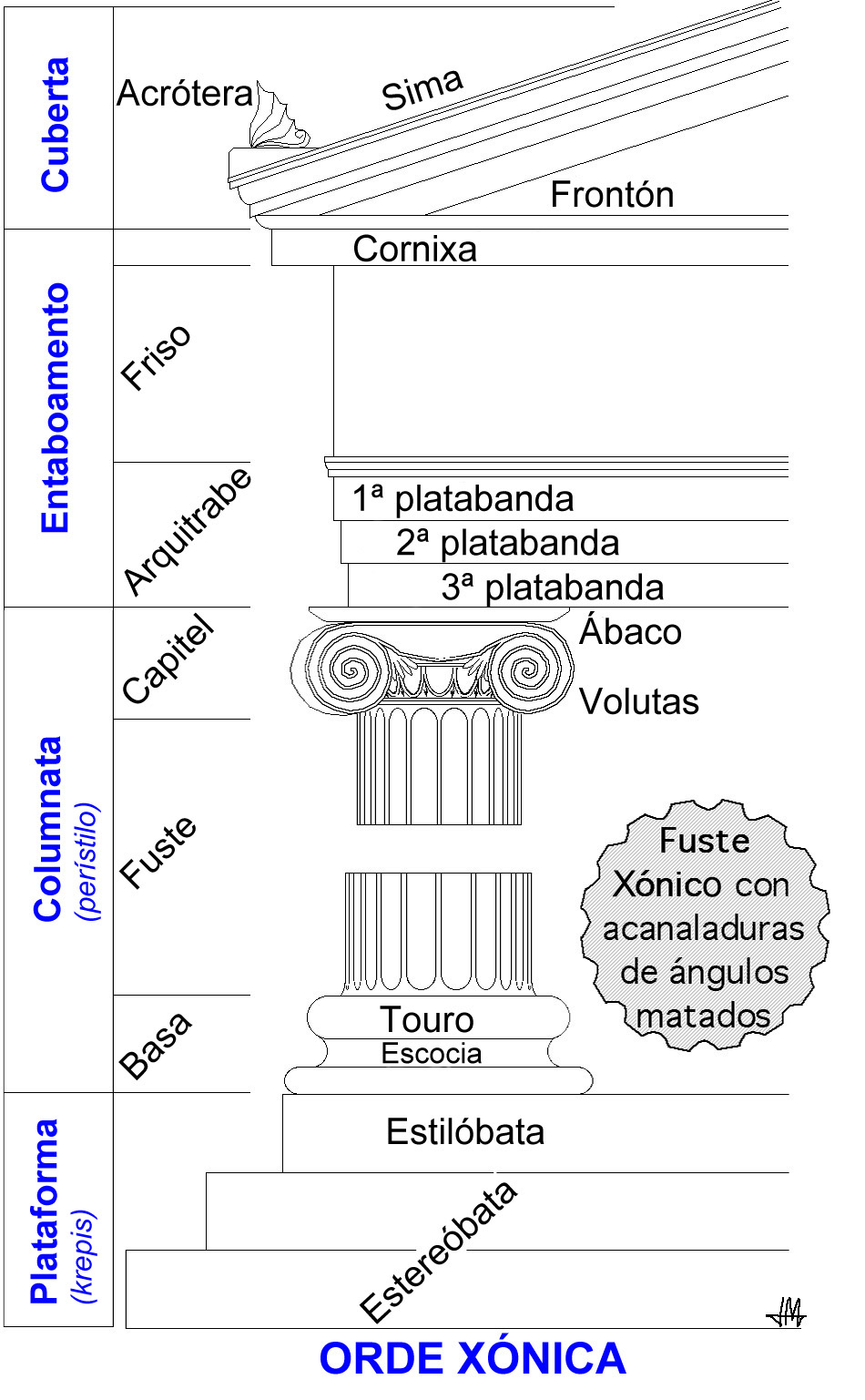 ORDE XÓNICA Plataforma escalonada (krepis ou crepidoma) Columnata (perístilo) Fuste con acanaladuras de arestas matadas Capitel Volutas Ábaco Entaboamento Arquitrabe dividido en tres bandas (platabandas) Friso Corrido Cornixa Cuberta Frontón Vertente ou Sima